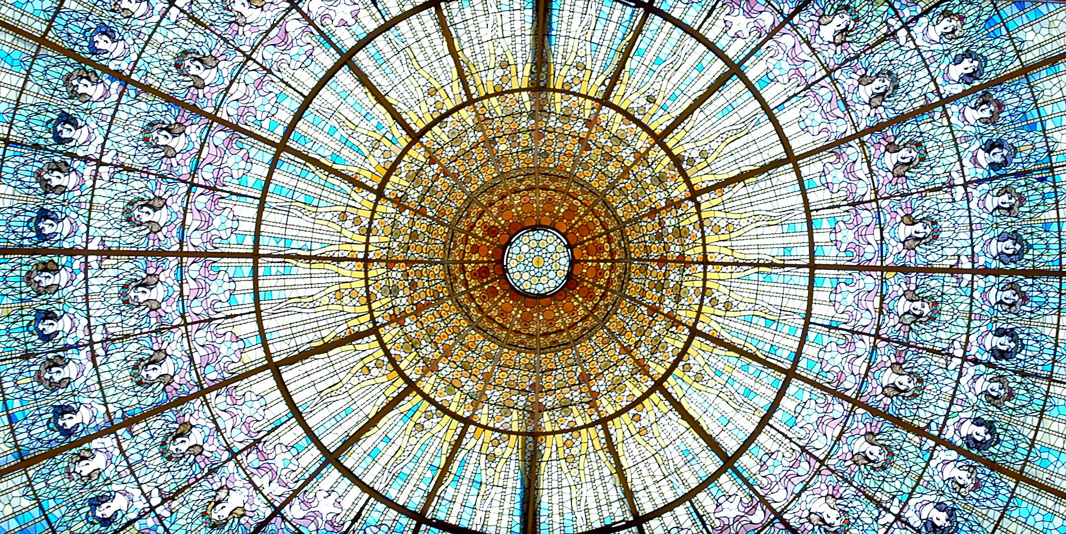 Palau - Vitrall platea